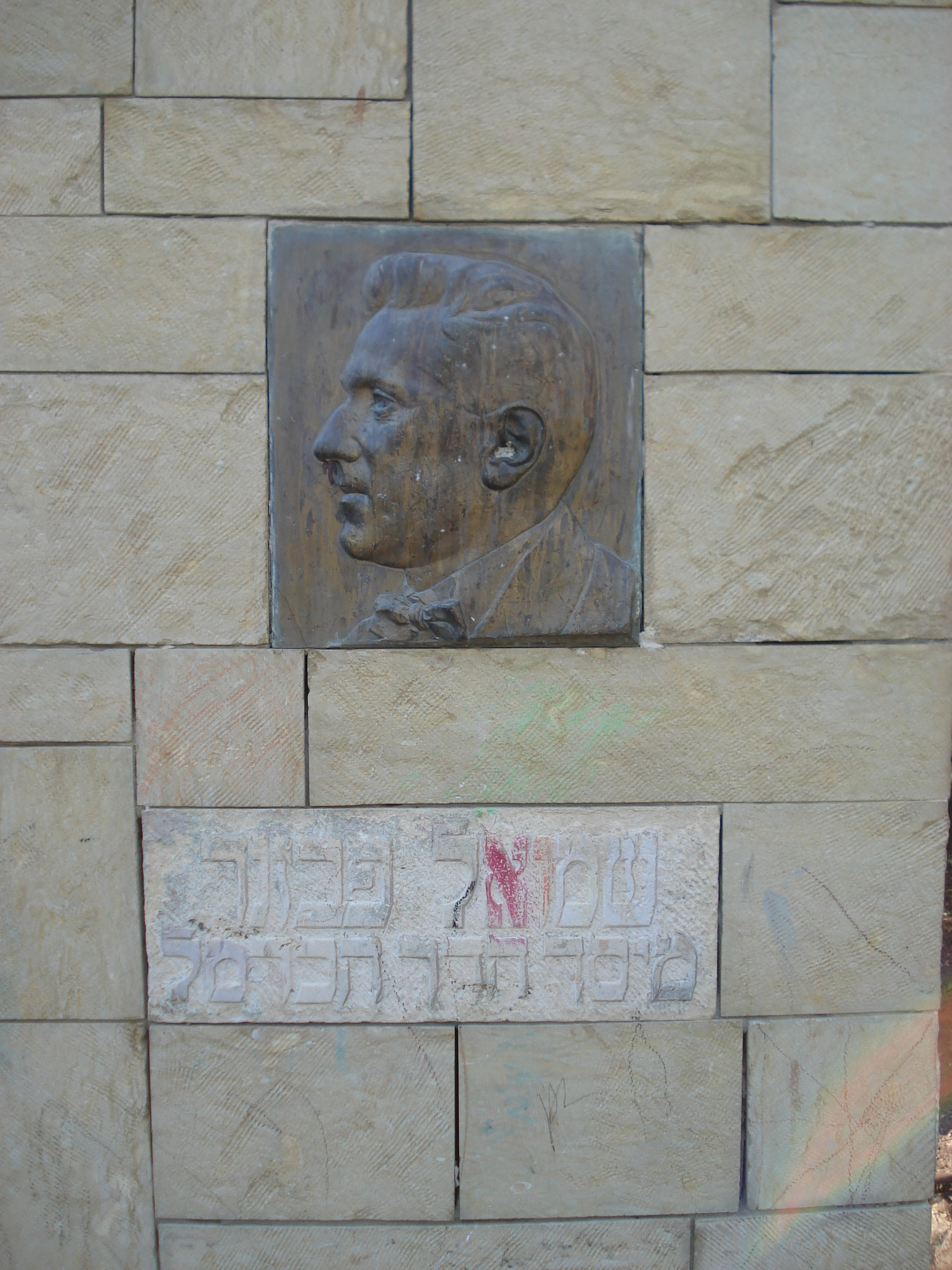 שלט הנצחה לפבזנר בכניסה לגן בנימין